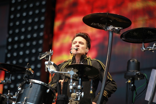 Bela B, bürgerlich Dirk Felsenheimer, Schlagzeuger der Band Die Ärzte, am 15. Juni 2013 im Kölner RheinEnergieStadion.